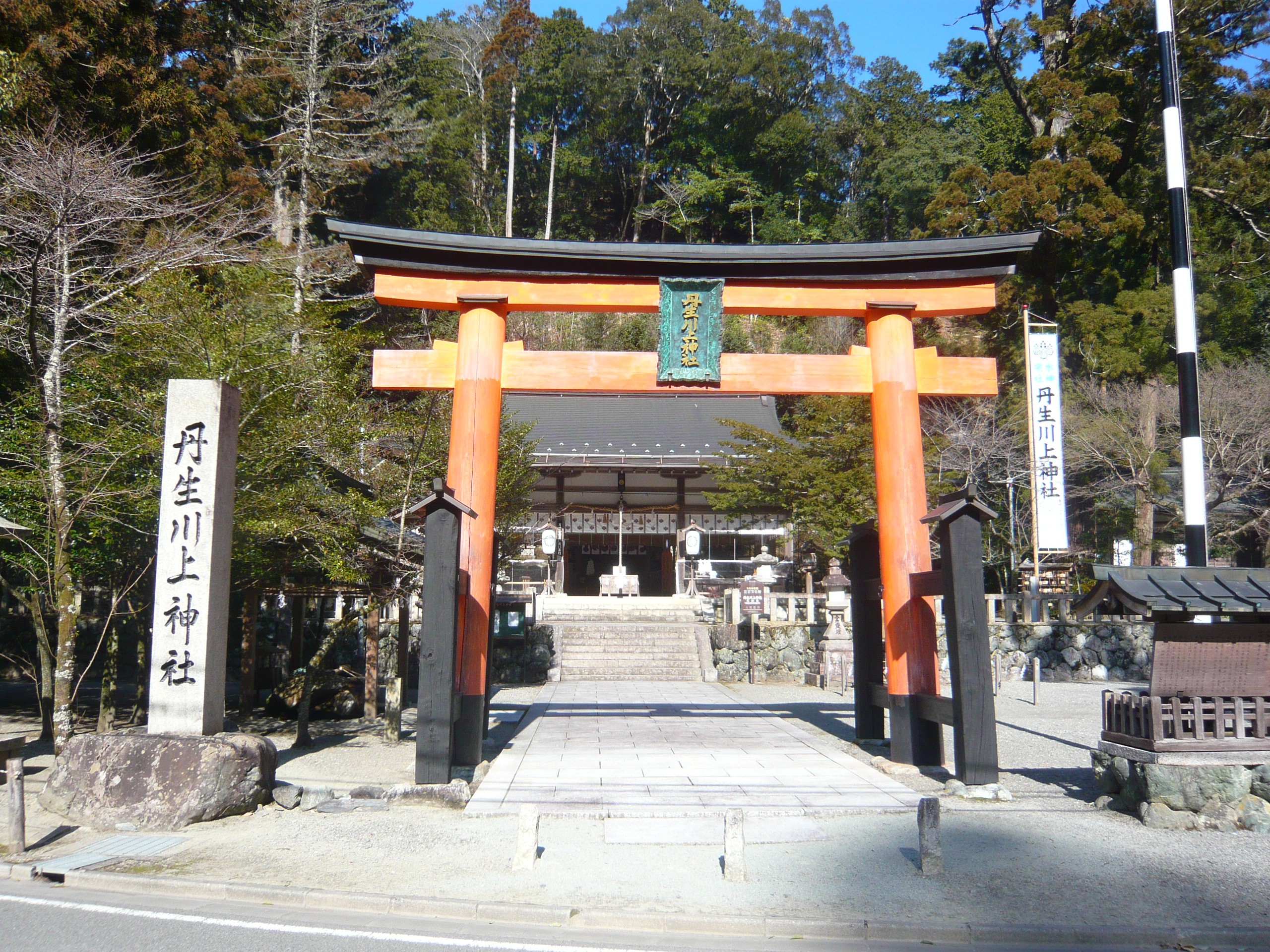 東吉野村小 丹生川上神社中社 鳥居 Niukawakami-jinja-nakasha 2011.2.22